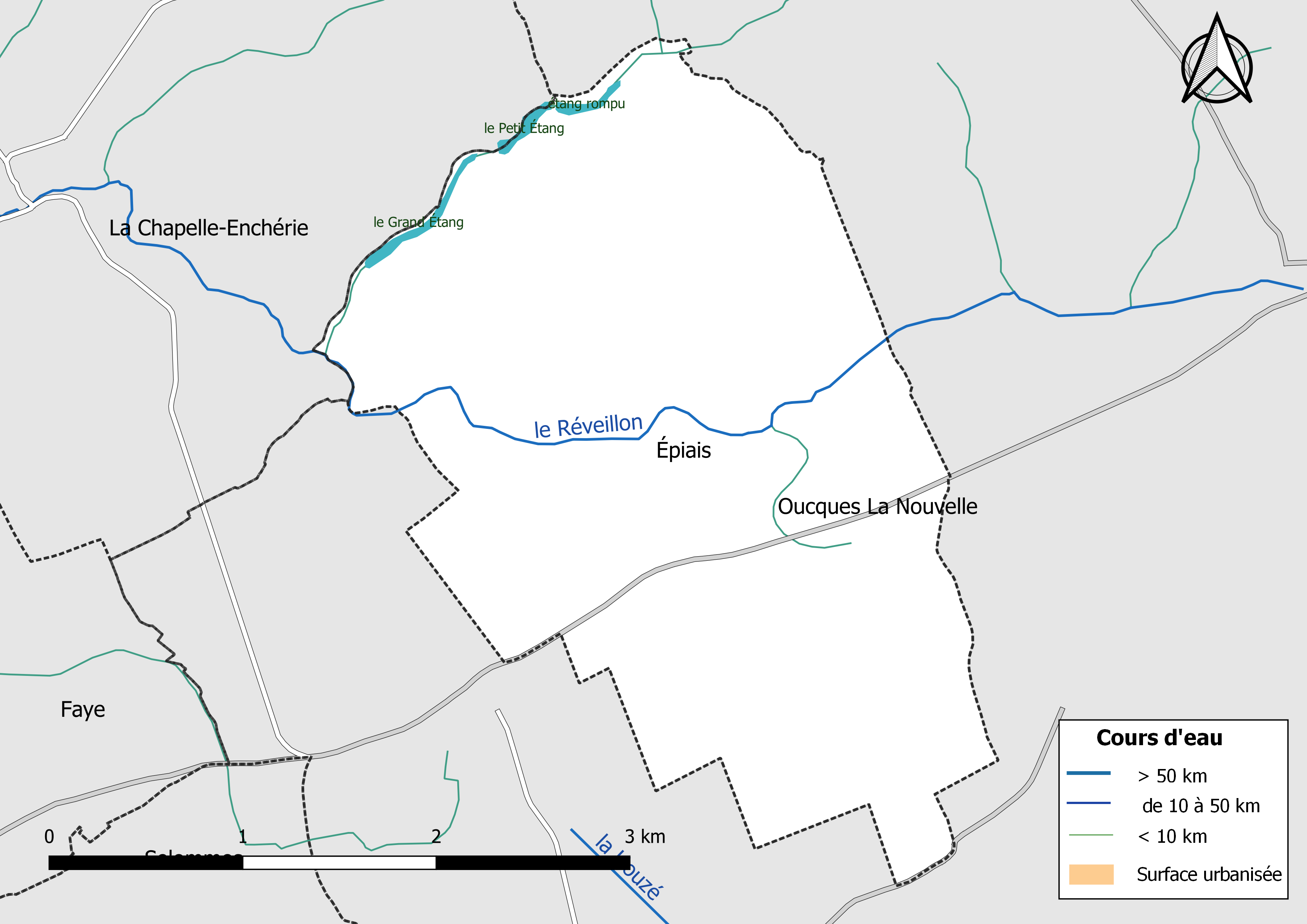 Carte du réseau hydrographique de la commune de Épiais (Loir-et-Cher, France).